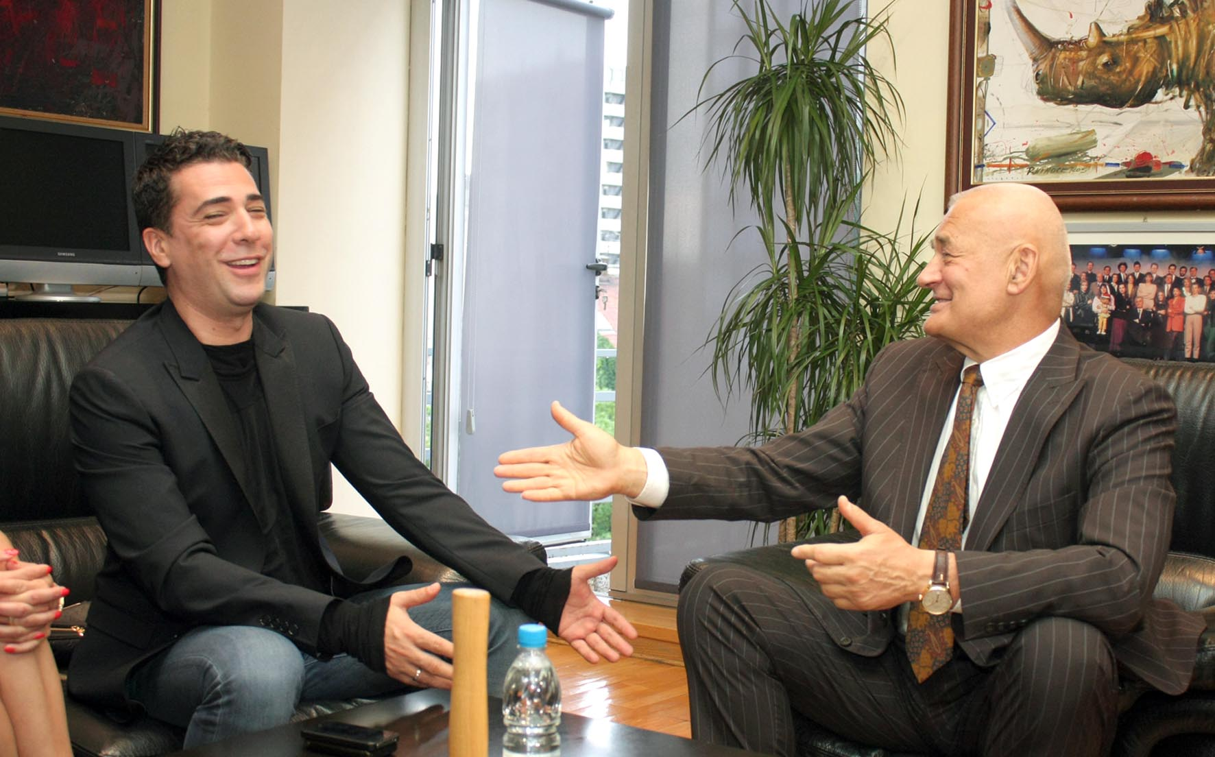 Жељко Јоксимовић и Александар Тијанић 2012